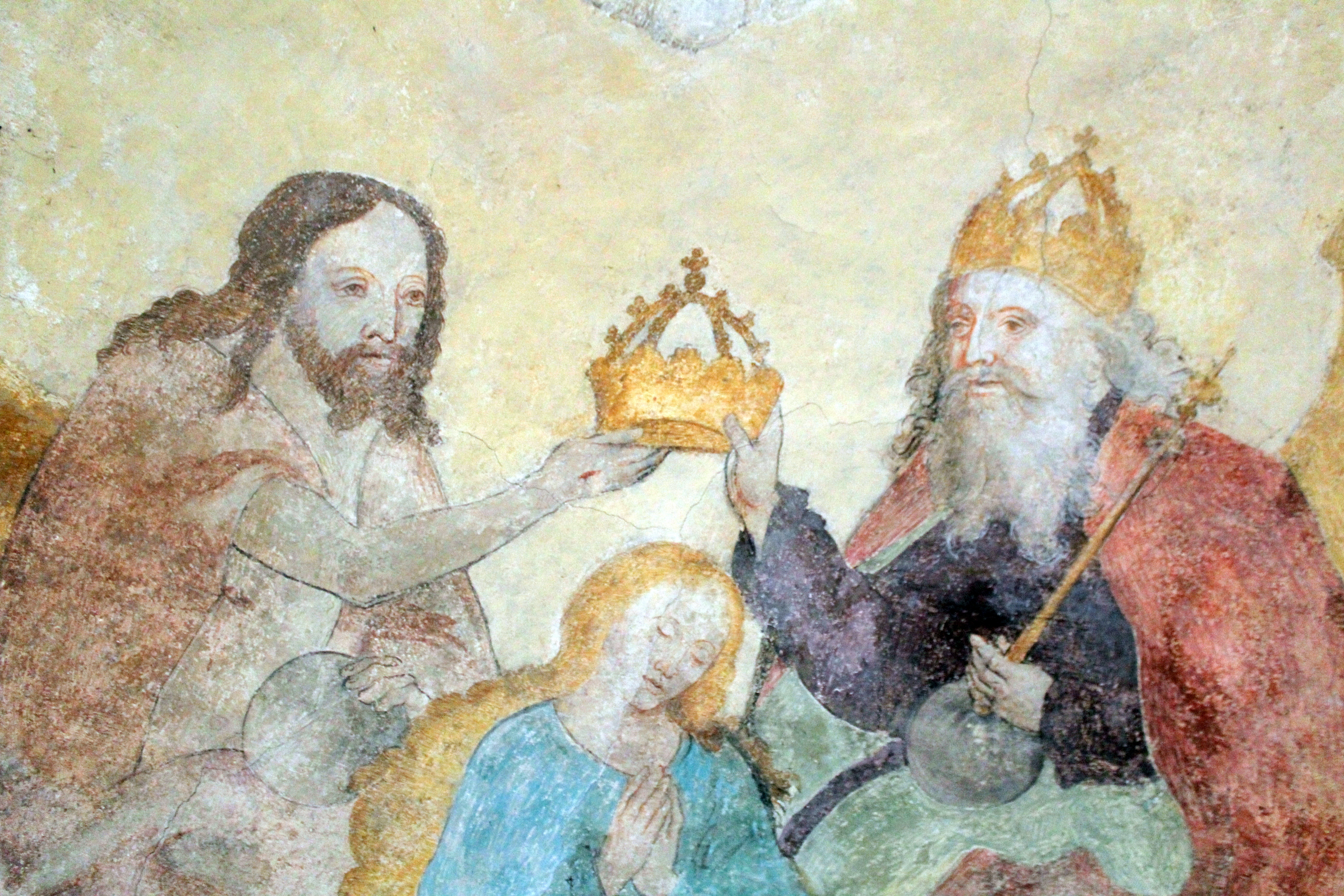 Weithin sichtbar über dem alten Stadtkern auf der Südseite der Burg Veringen in Veringenstadt steht eine romanische Kapelle. Sie ist den Heiligen Petrus und Paulus geweiht, wird aber von alters her allgemein Peterskapelle oder im Volksmund Peterskirchle genannt. Die Erbauung geht in das 10. oder 11. Jahrhundert zurück. Die Fresken (um 1515) stammen von Peter Strüb dem Jüngeren aus Veringenstadt, auch Meister von Sigmaringen genannt.